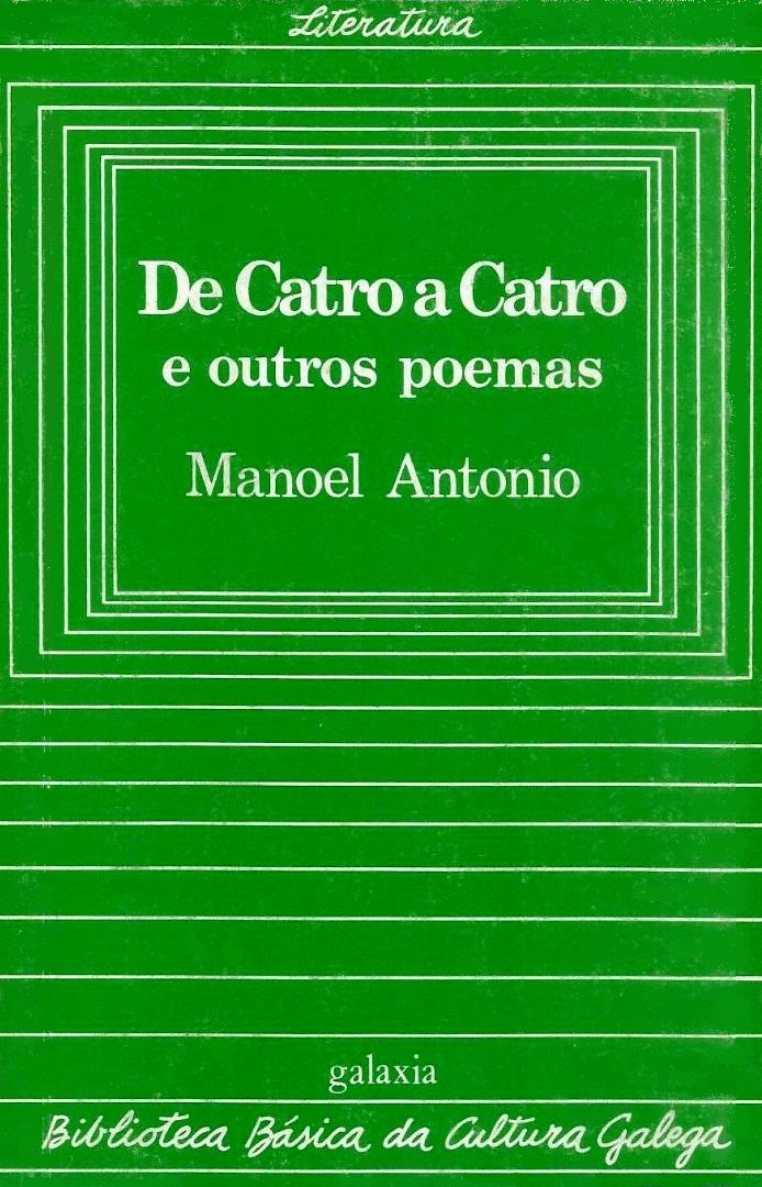 Biblioteca Básica da Cultura Galega, 35, De catro a catro, Manoel Antonio